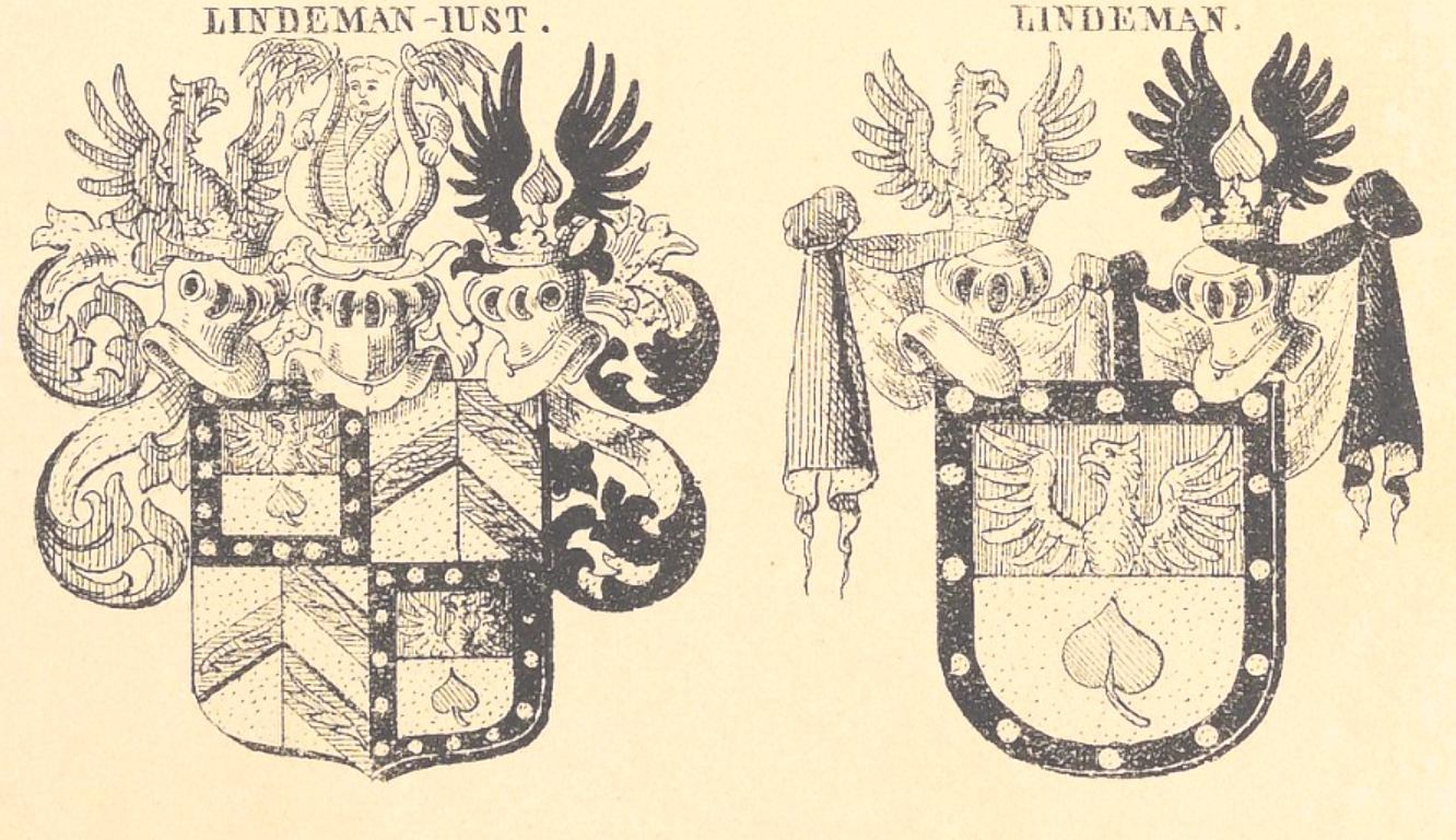 Wappen Freiherr von Lindeman-Just, nach Wappenmehrung durch Frhr von Just ab Mai 1824